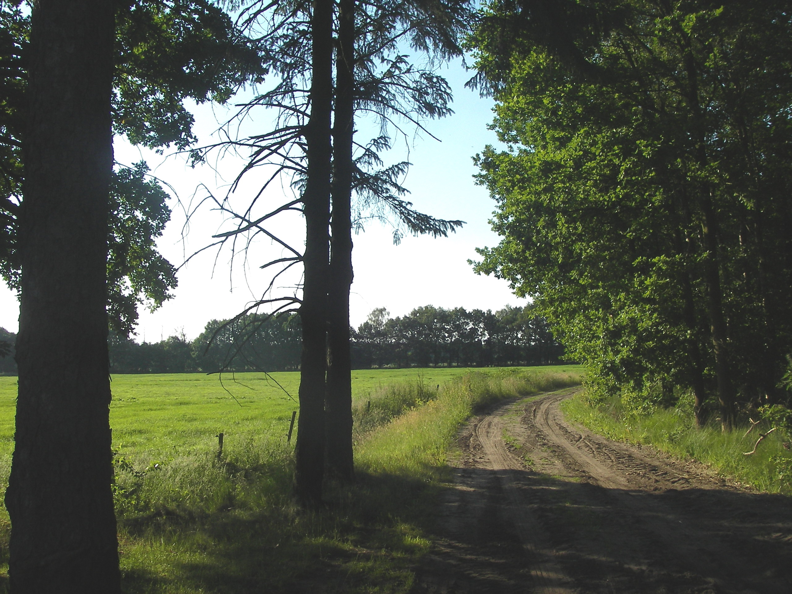 Bos en weiden op de plek van het vroegere Groot Huisven